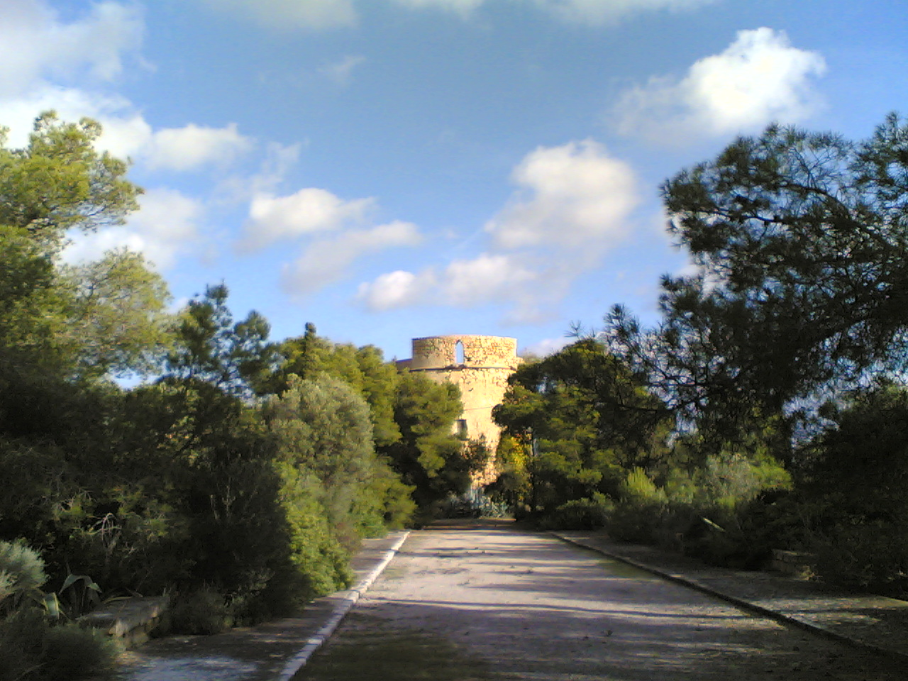 Torre de sa Porrassa (Calvià)